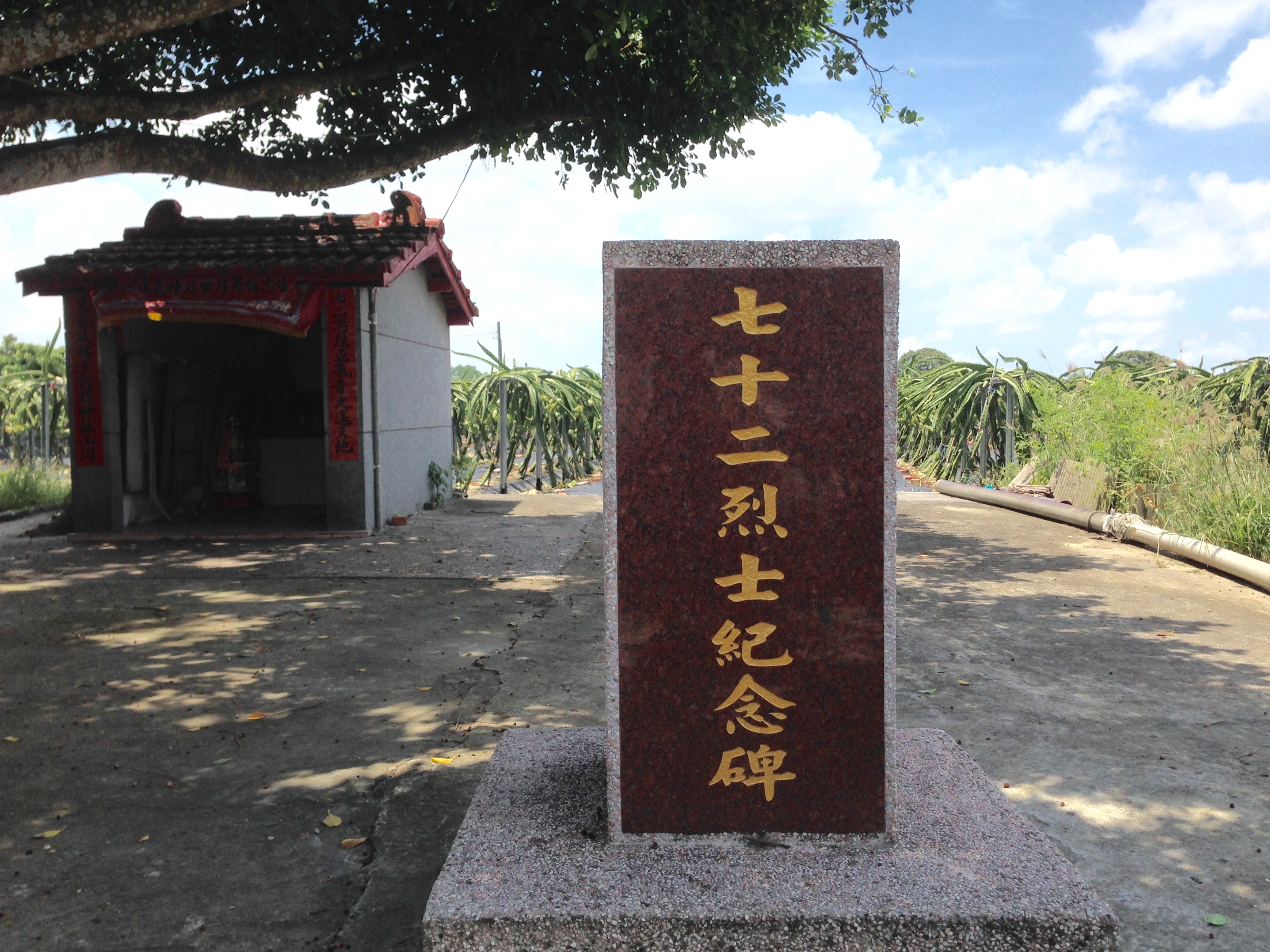 七十二烈士碑與七十二聖人廟